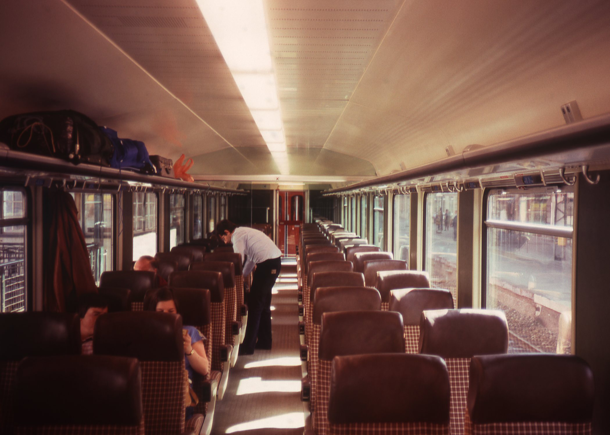 Een Zwitserse salonwagen op de Brussel Basel trein